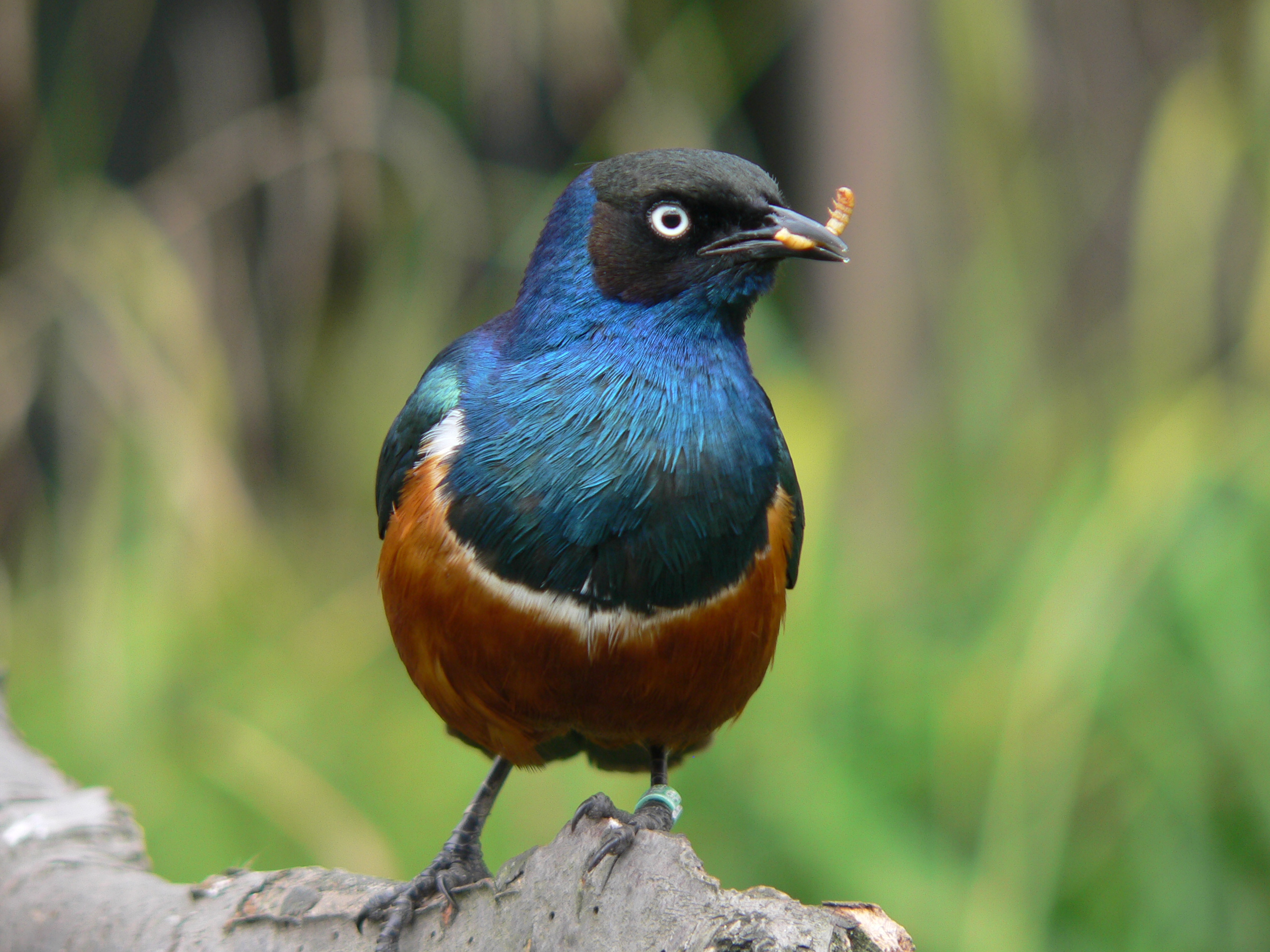 Dreifarben-Glanzstar